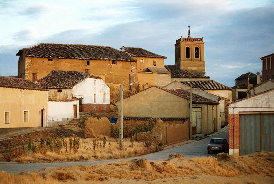 Tamariz de Campos (Valladolid). Calle del Río.